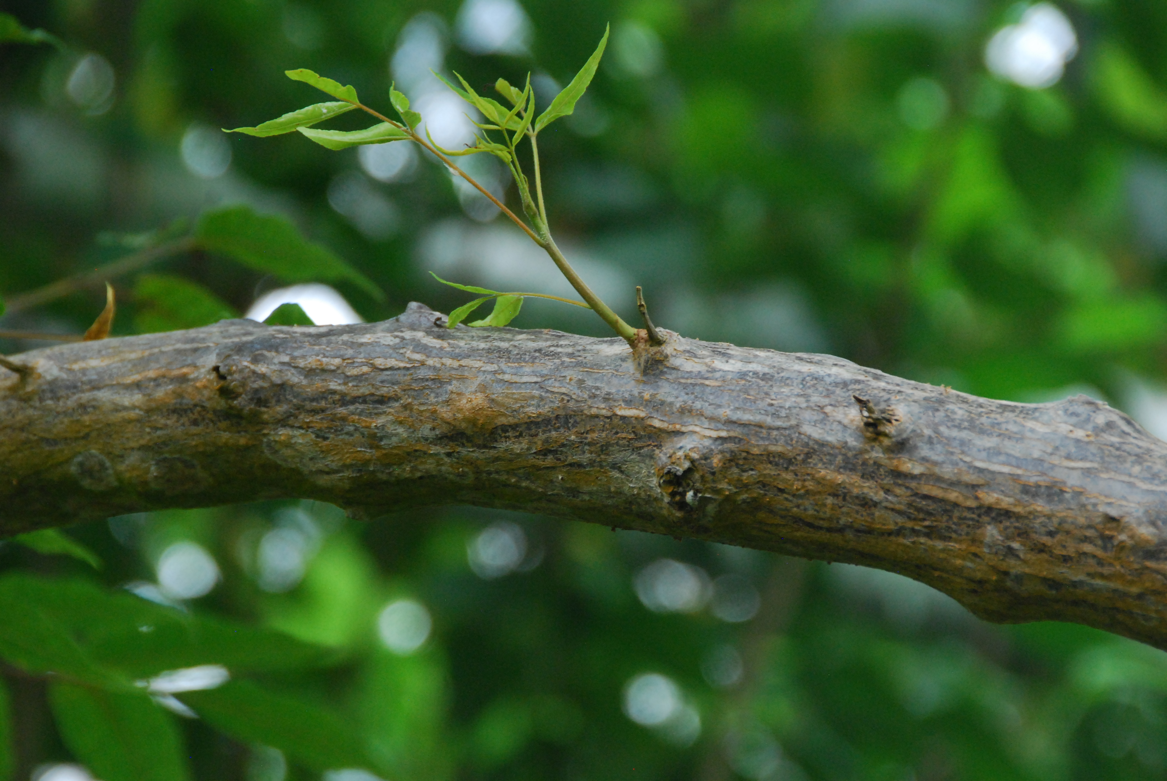 L'espèce "Poupartia castanea" dans les serres tropicales N°4 correspondant au climat forêts tropicales humides du Conservatoire Botanique National de Brest. Photo prise lors des journées contributives au Conservatoire Botanique National de Brest durant l'été 2015